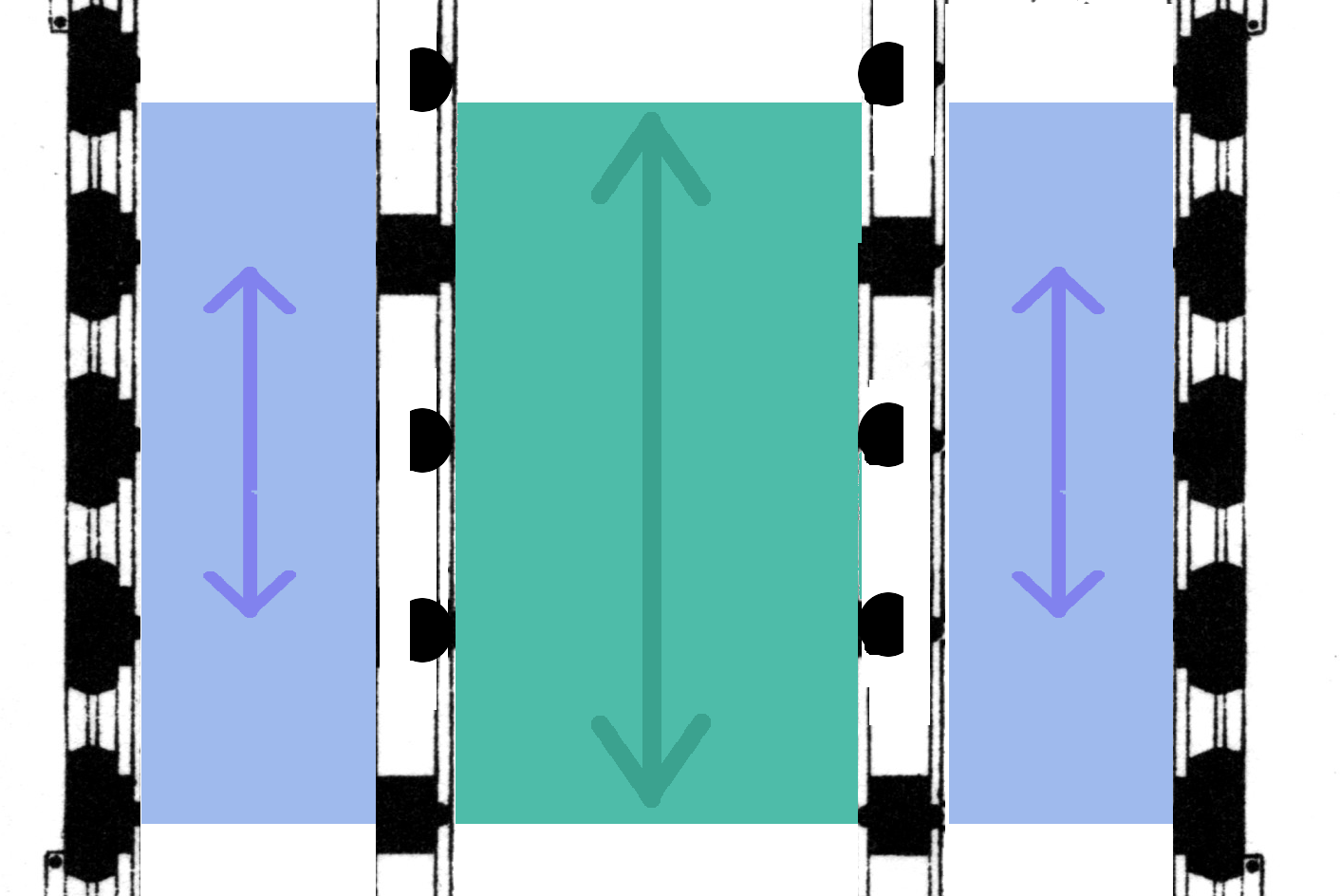 Prinzip Basilika Stuetzenwechsel